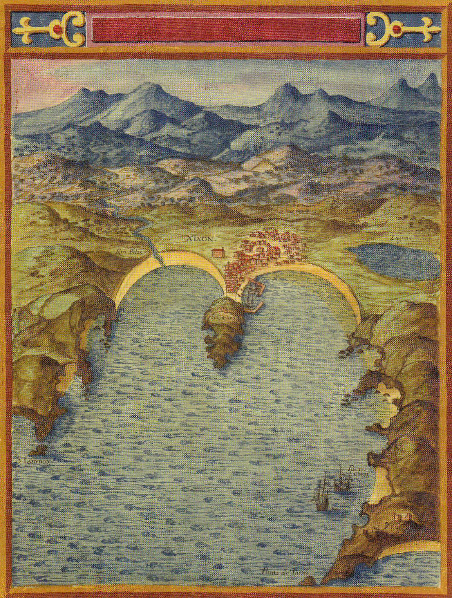 "Vista del puerto de Xixón", de Pedro Texeira, año 1634. Pertenece a "La descripción de España y de las costas y puertos de sus reinos" (1622-1634), y la imagen fue obtenida del libro "Gijón a escala: La ciudad a través de su cartografía", Francisco Javier Granda Álvarez, Ayuntamiento de Gijón, 2003.